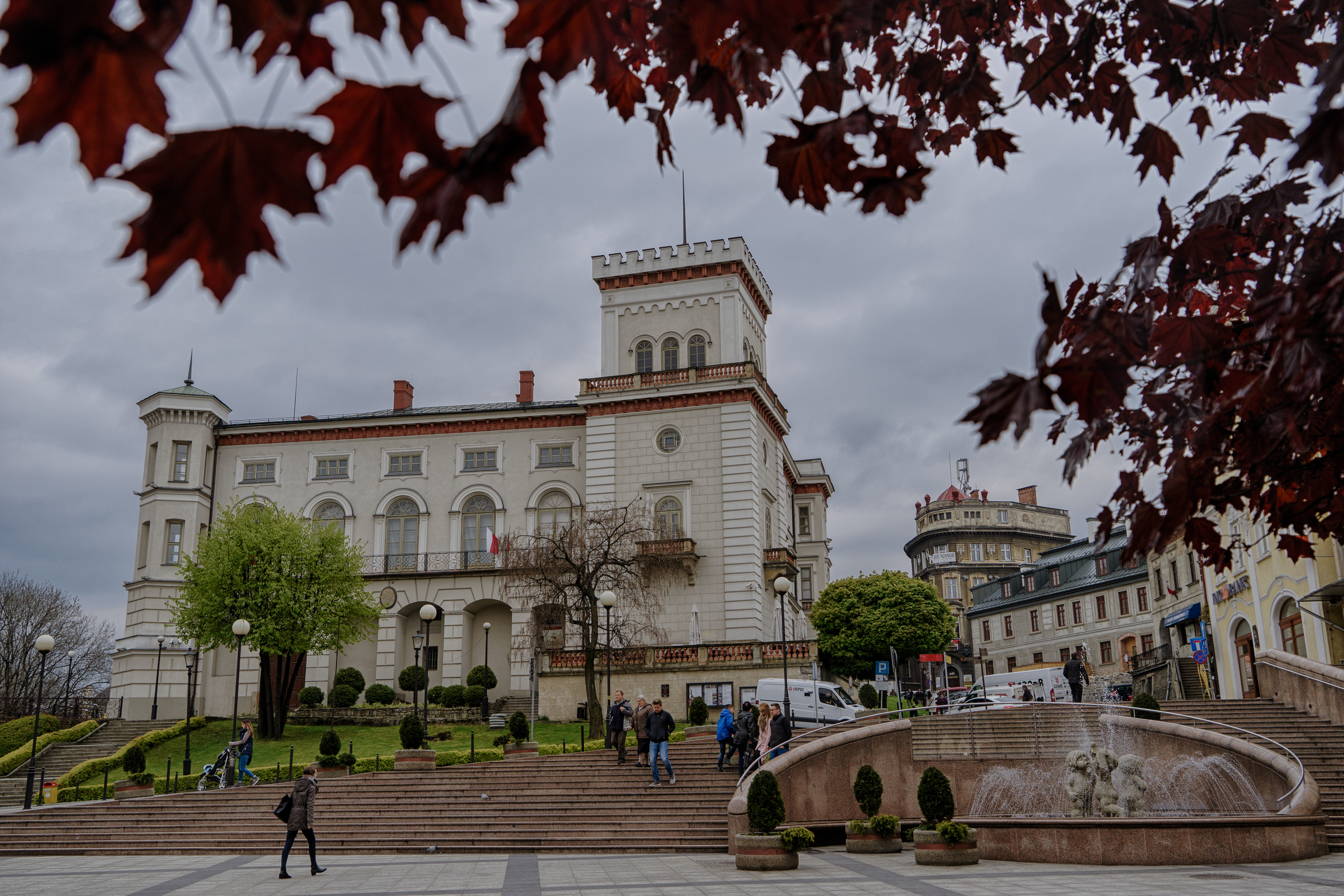 Bielsko-Biała, d. Zamek książąt Sułkowskich, Wikidata has entry Q30062524 with data related to this item.